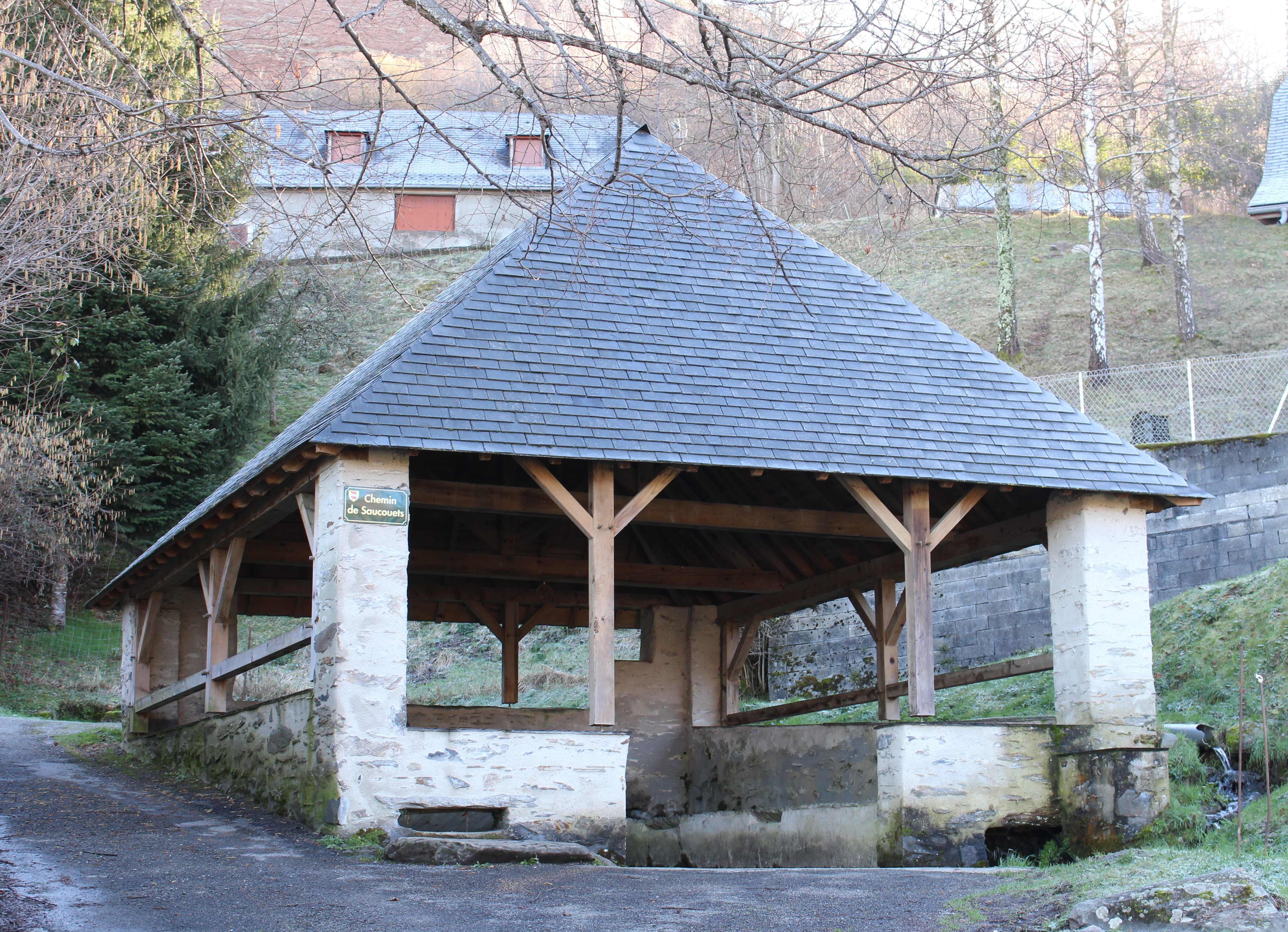 Lavoir de Gazost (Hautes-Pyrénées)